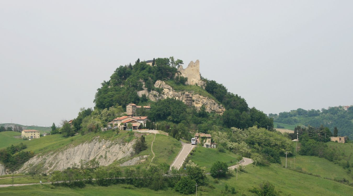 Italien/Italia/Italy: Emilia-Romagna, Prov. Reggio nell'Emilia, Castello di Canossa